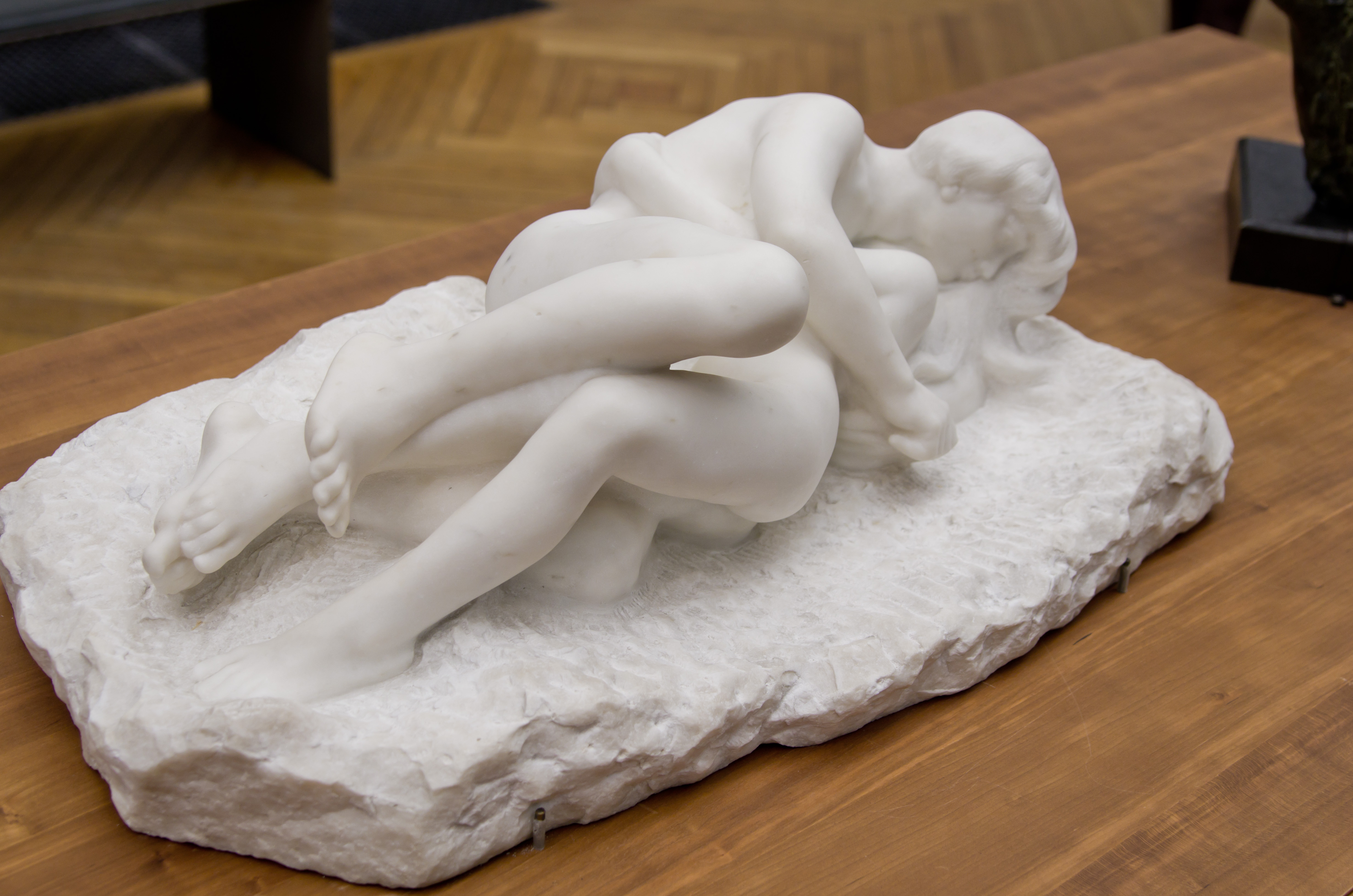 Amour et Psyché par Auguste Rodin, marbre d’après modèle plâtre, vers 1885 (exposé au Petit Palais)